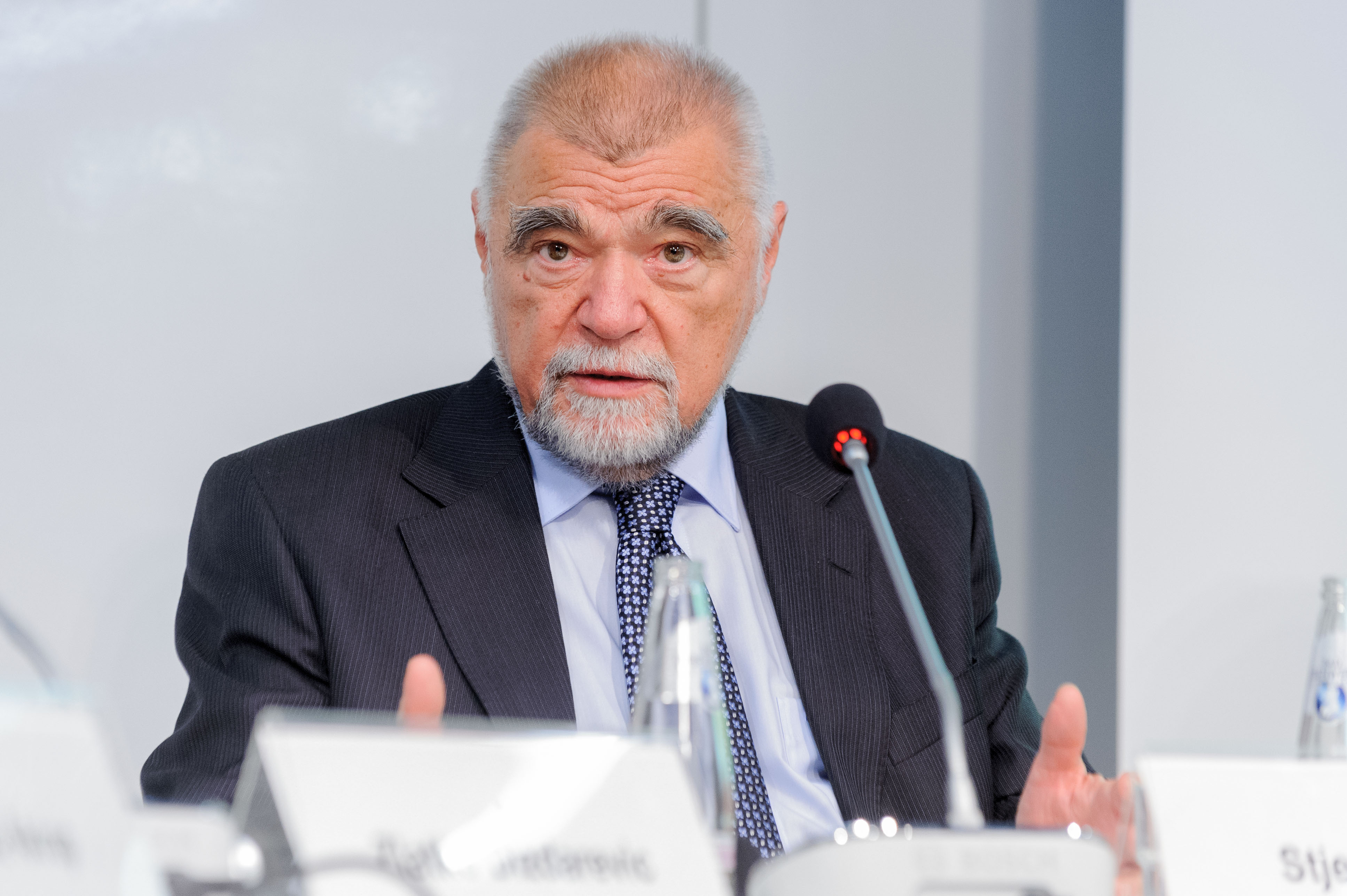 Stjepan Mesic (ehem. Präsident der Republik Kroatien) EU-Beitritt Kroatien - Vortrag und Podiumsdiskussion zu den regionalen Auswirkungen des kroatischen EU-Beitritts Foto: Stephan Röhl (